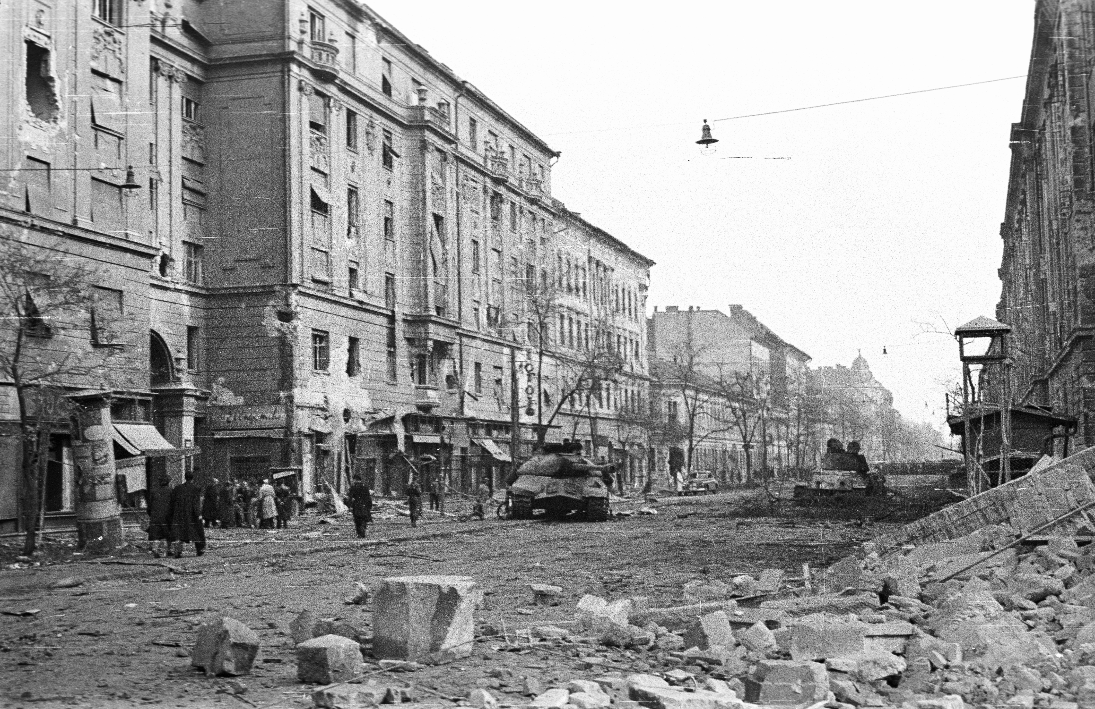 Üllői út a Nagykörút felől a Vajdahunyad utca felé nézve. Location: Hungary, Budapest VIII. Tags: revolution, street view, tank, damaged building, ad pillar, war damage, Soviet brand, IS-3 tank, poster, Budapest Title: Üllői út a Nagykörút felől a Vajdahunyad utca felé nézve.